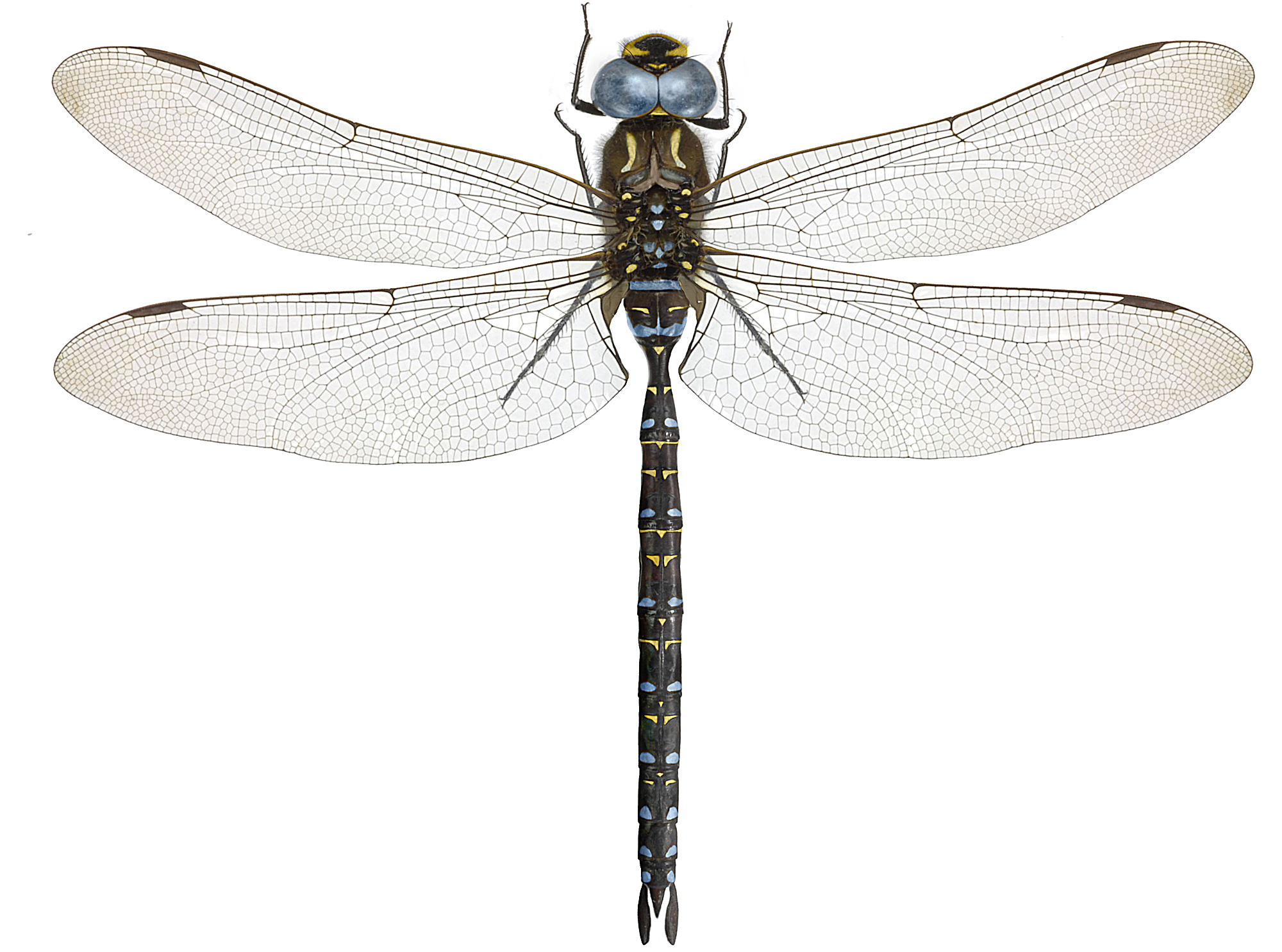 Aeshna subarctica (male)